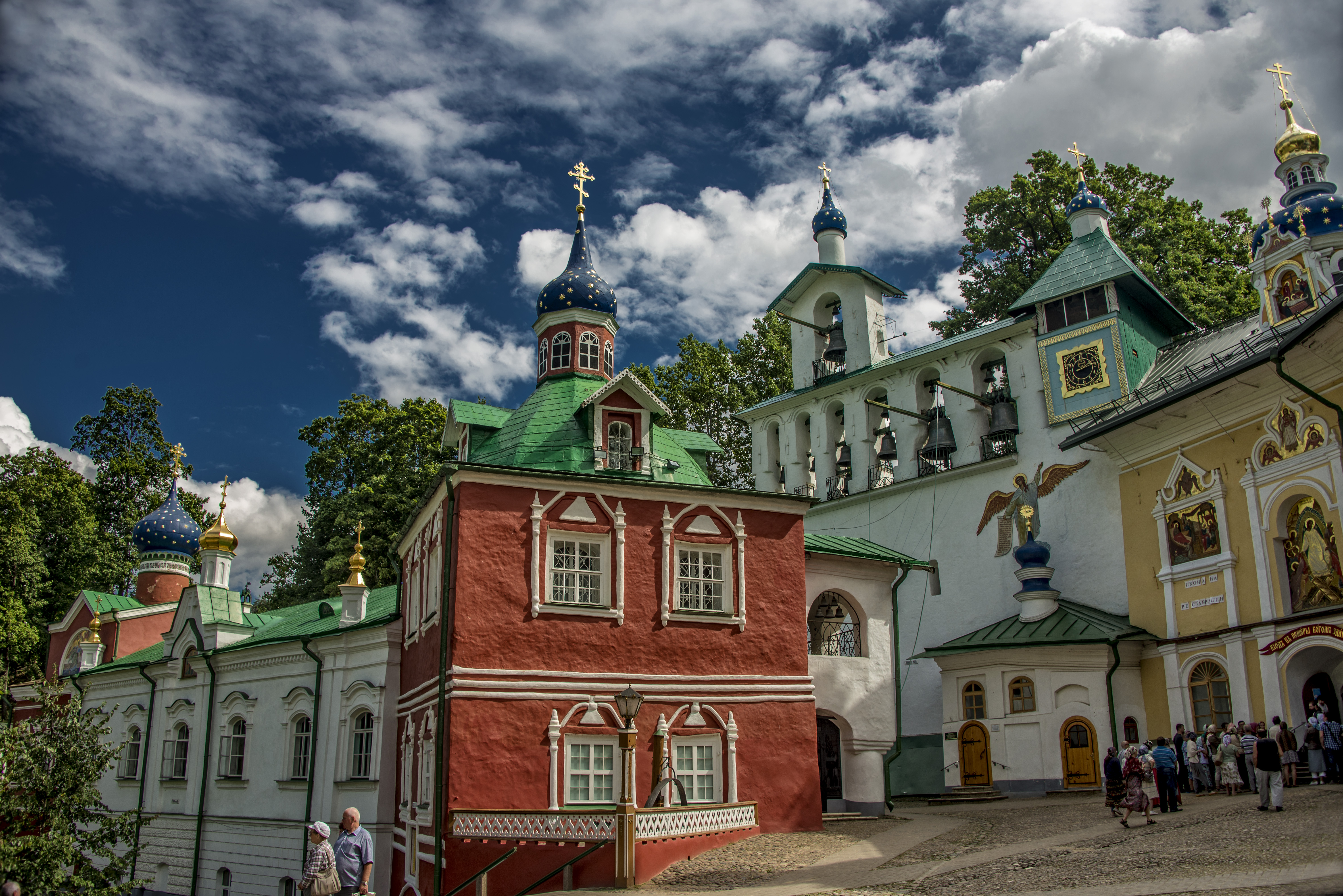 ризница с библиотекой: Печоры, Печорский район, Псковская область